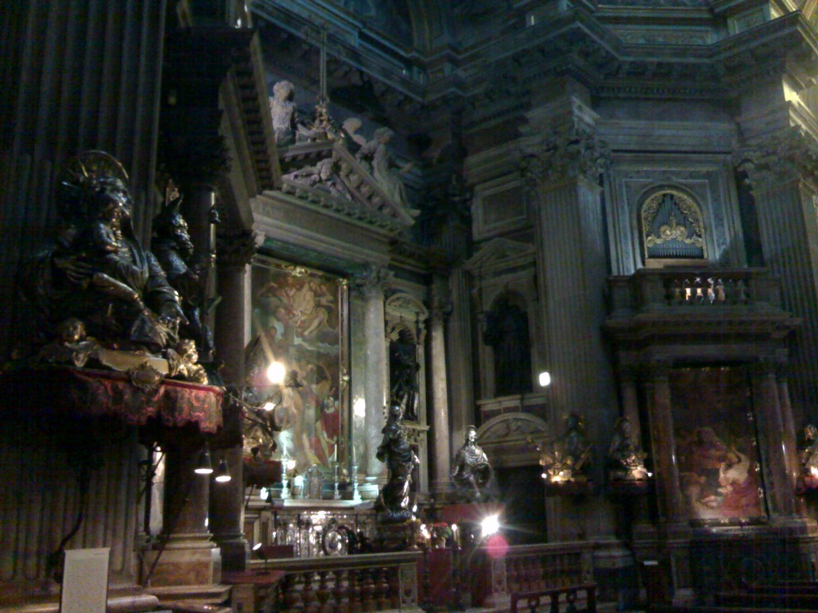 Reale Cappella del Tesoro di San Gennaro (Napoli) - L'altare di sinistra